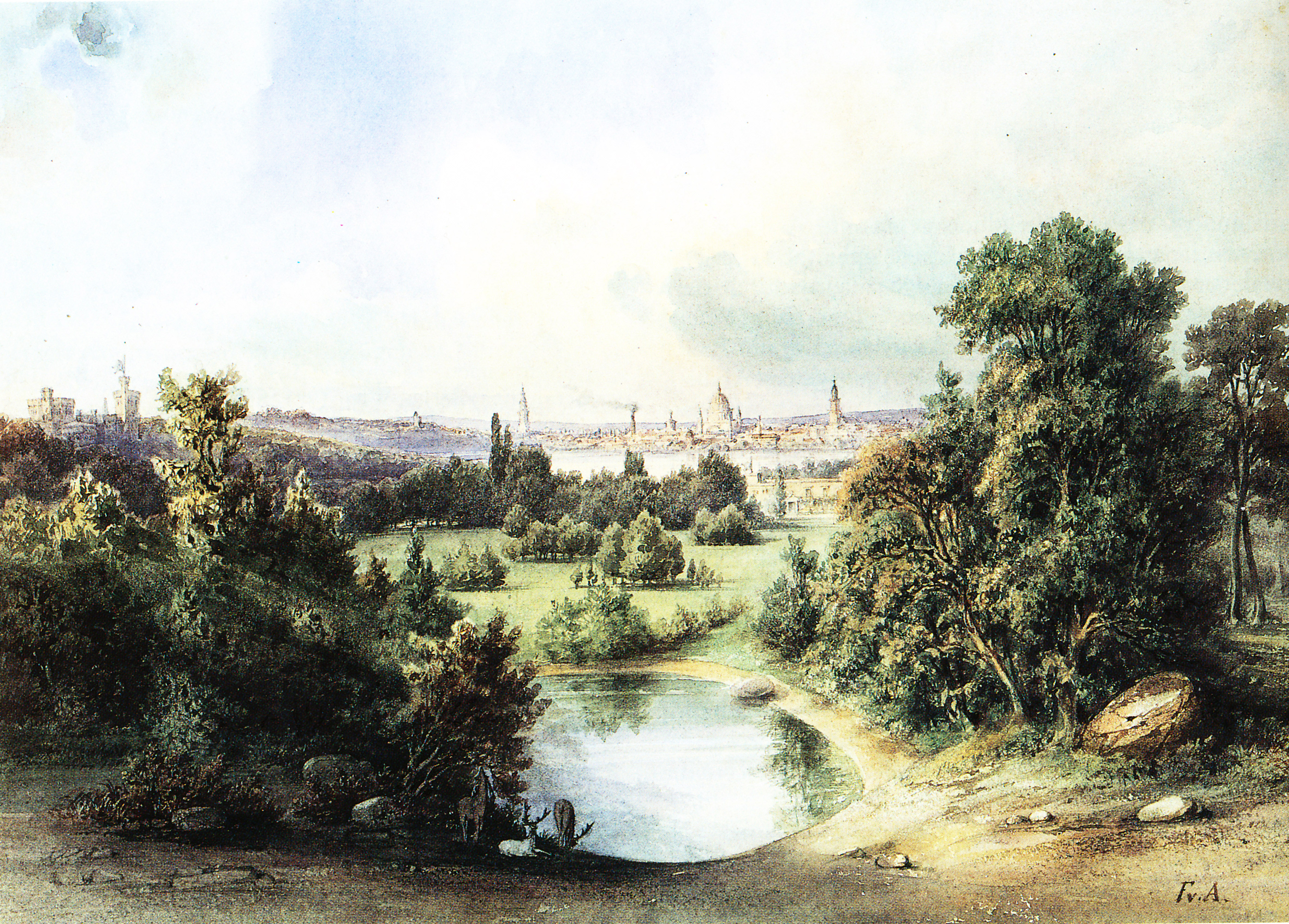 Blick von der Römischen Bank im Park Klein-Glienicke, Aquarell von Ferdinand von Arnim 1851